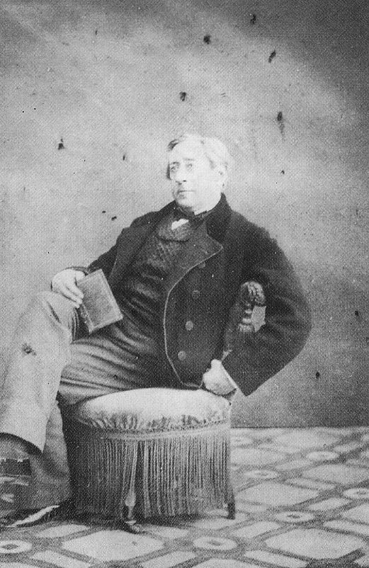 Fotografía del arquitecto español Narciso Pascual y Colomer